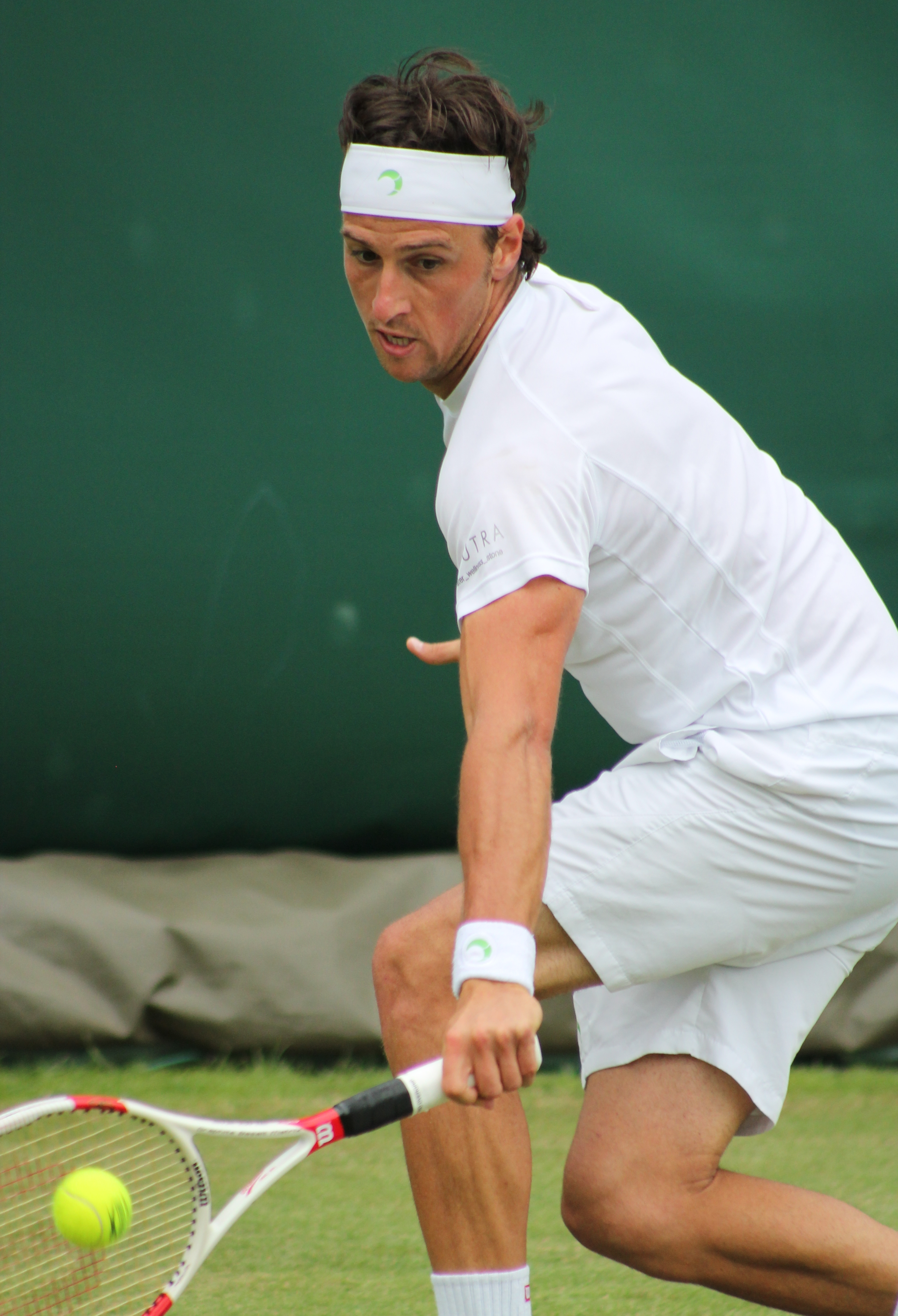 Arnaboldi WMQ14 (2)